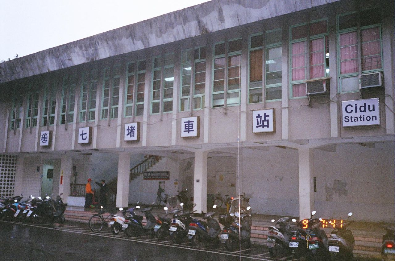 臺灣鐵路管理局七堵車站後站正面外觀。